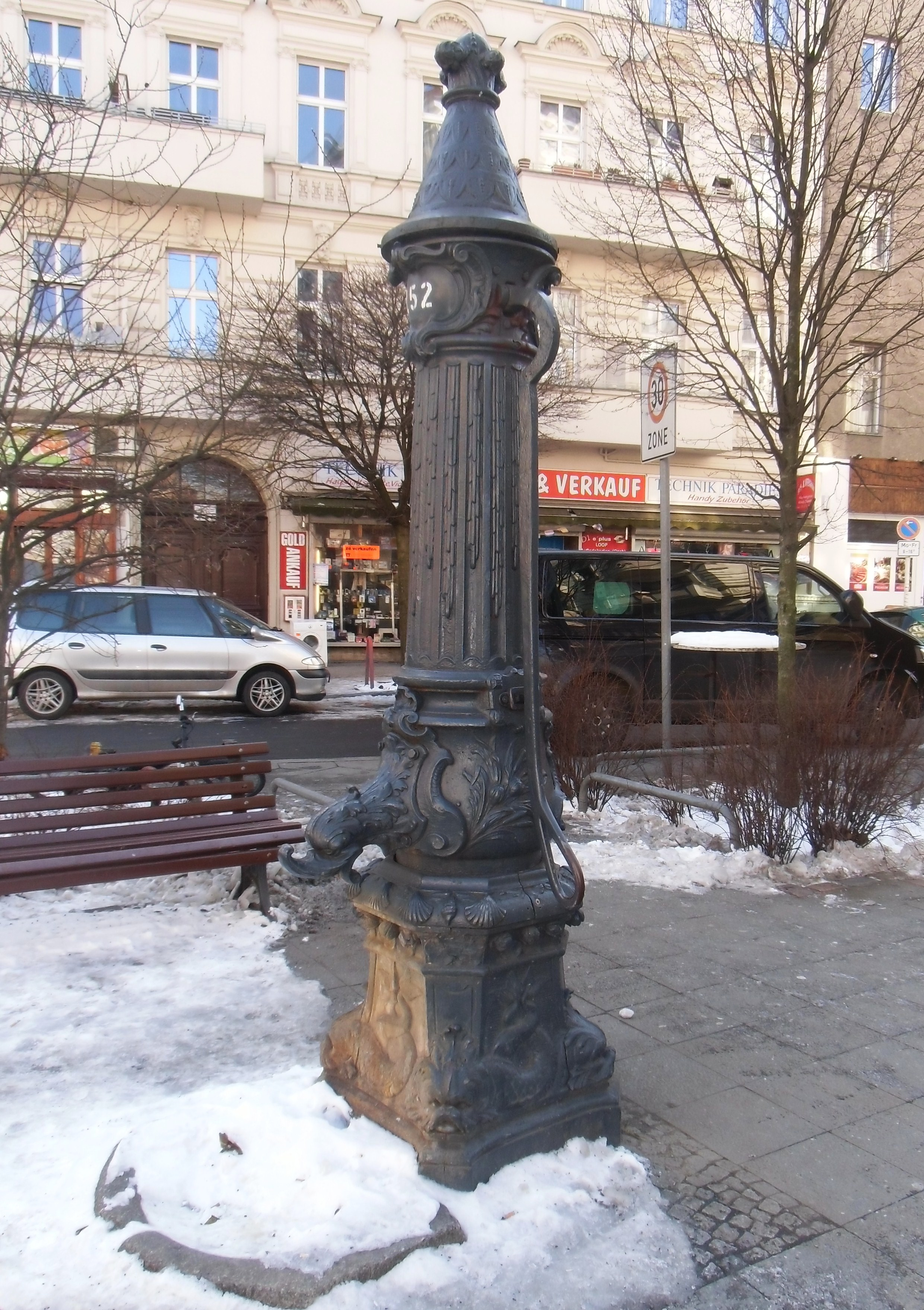 Historische Wasserpumpe, Badstraße Ecke Buttmannstraße, nach 1892 aufgestellt, entworfen von Regierungsbaumeister Otto Stahn